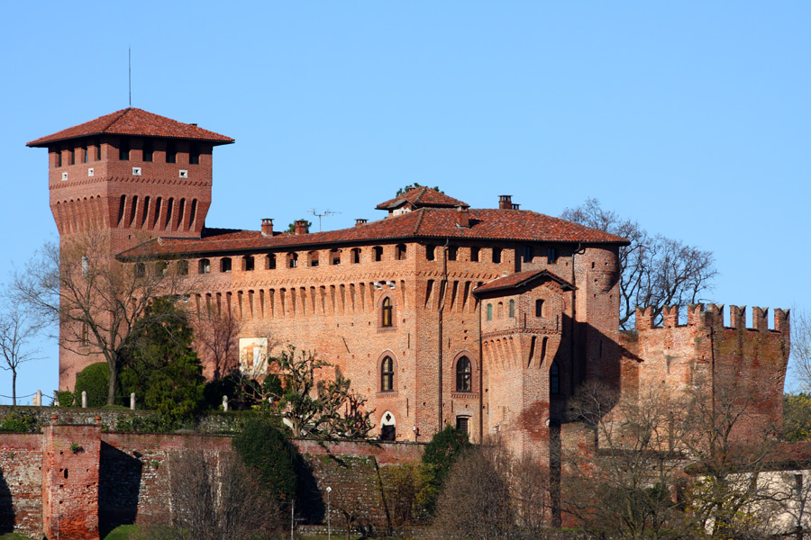 Castello di Barengo (NO)